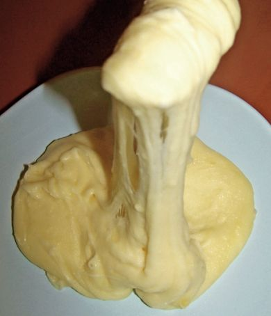 Un plat d'aligot, un puré occità de patata i formatge